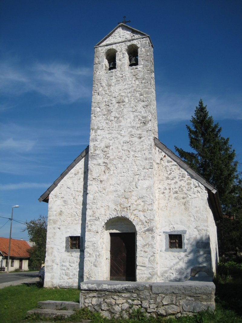 Kapela Svetog Fabijana i Sebastijana (najstarija sačuvana romanička crkva u Gackoj), Brinje, Croatia.